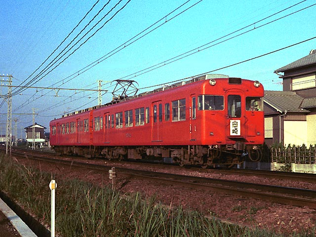 名鉄3780系3782編成。名古屋本線知立 - 牛田間にて撮影。